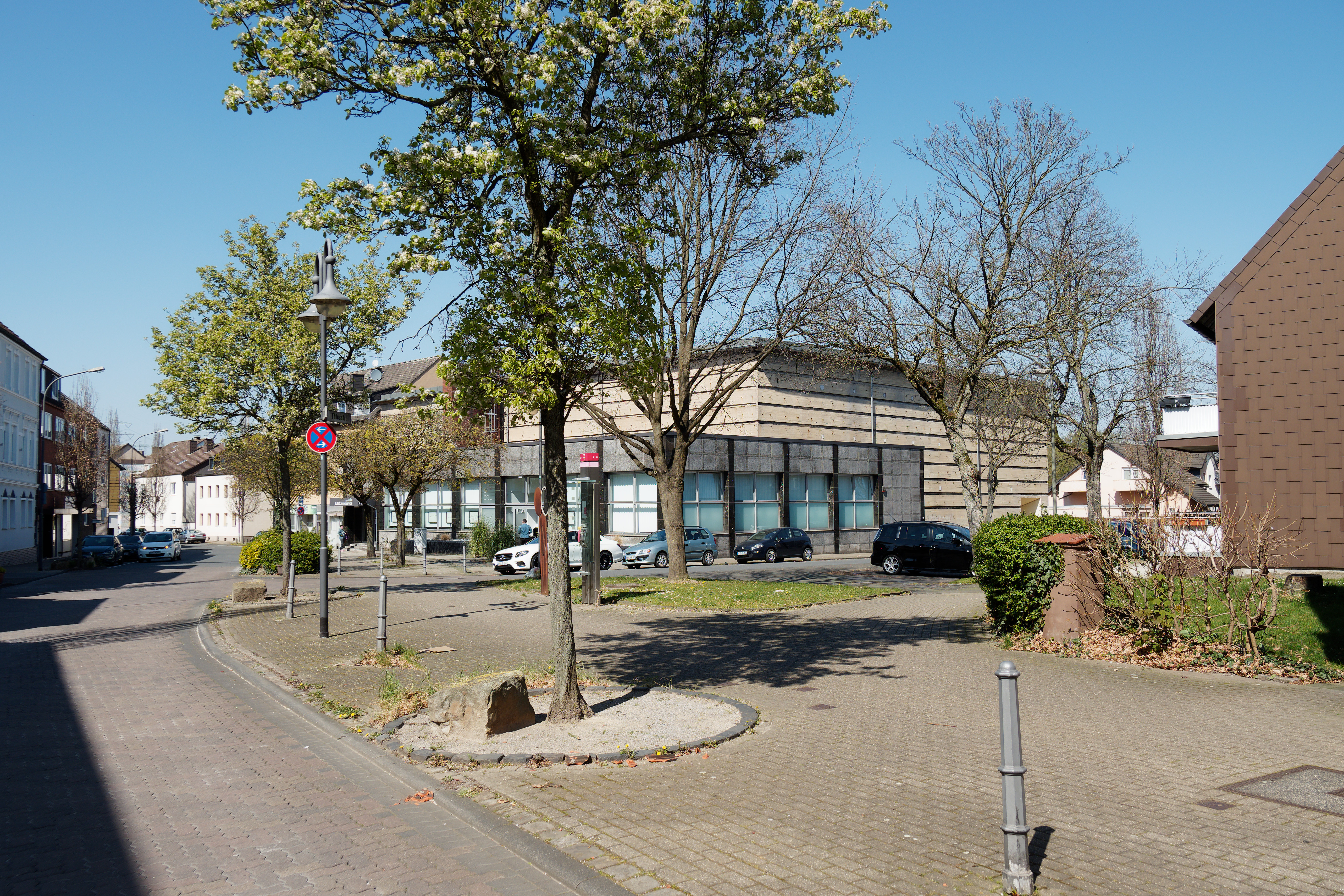 Herne-Wanne Ortsteil Bickern, im Bild die Bickernstraße an der Ecke Thiesstraße